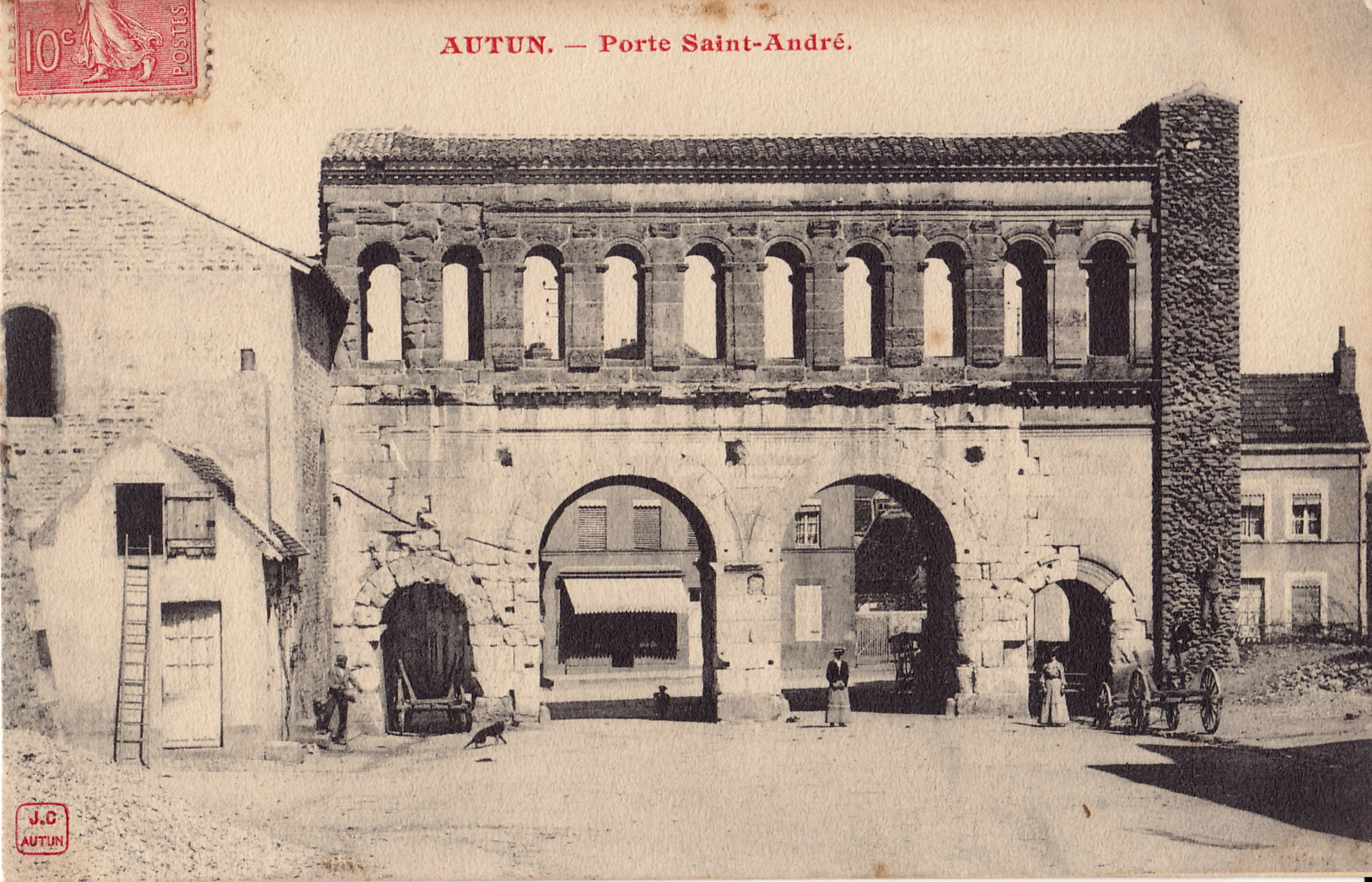 Carte postale ancienne éditée par J. C. à Autun :AUTUN - La Porte Saint-André